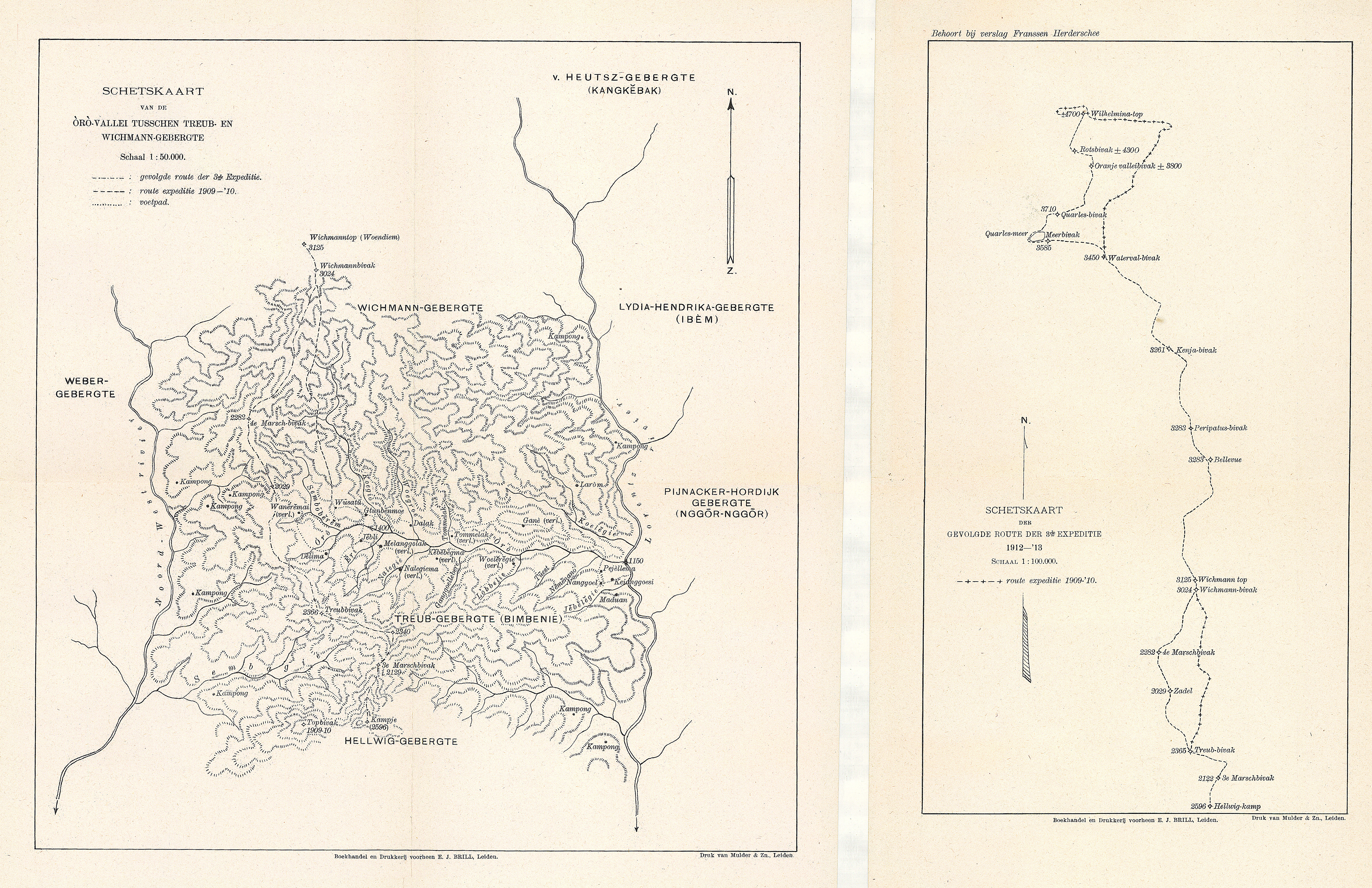 Schetskaart der gevolgde route der 3de expeditie 1912-’13 Scale 1:100.000